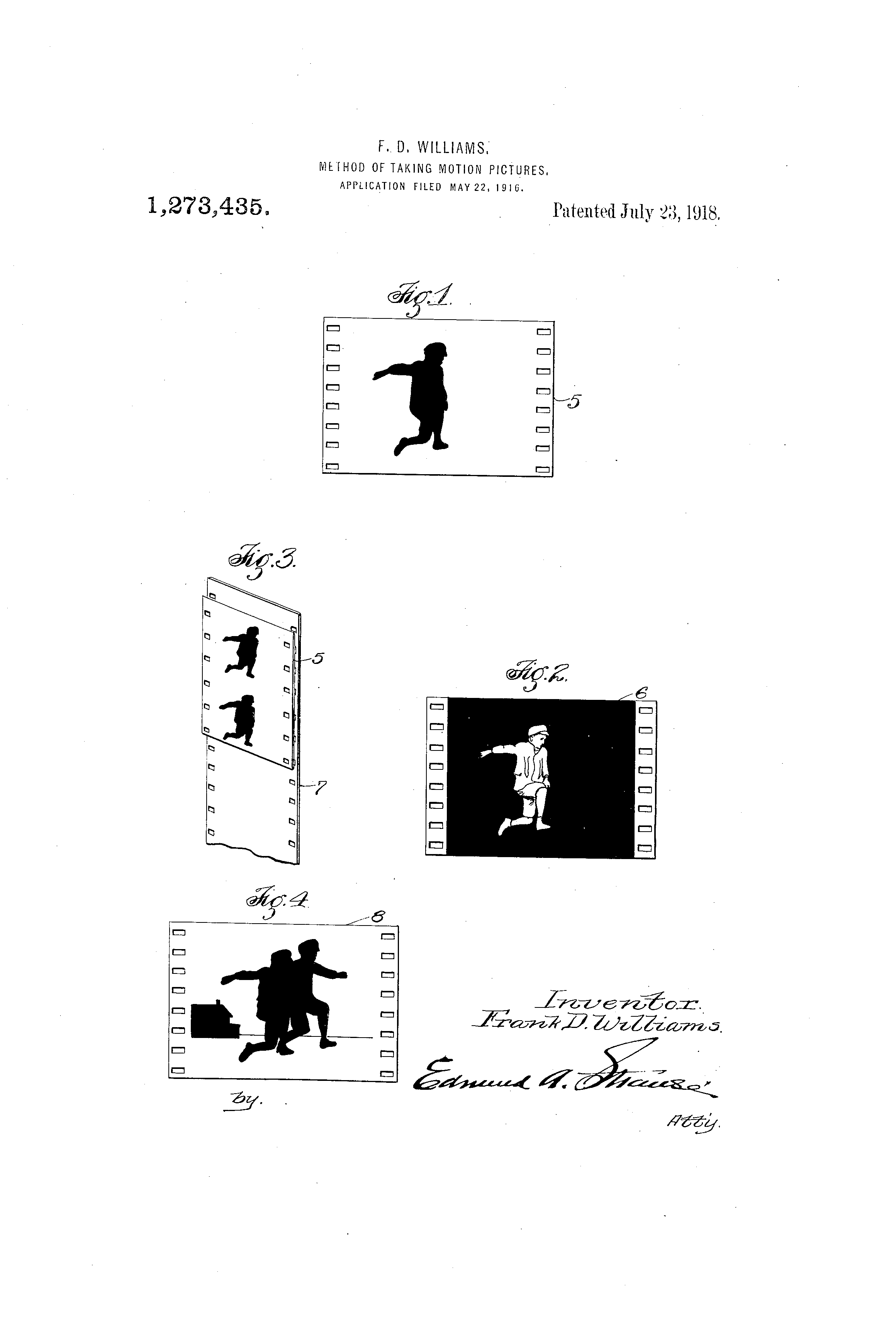 Patent realitzada per Frank D. Williams en què observem els diferents passos del procés Williams. En la figura 1 veiem la reproducció d'un fotograma negatiu en blanc amb la silueta d'un nen de color negre; això seria equivalent al "holdout matte". En la figura 2 veiem la còpia inversa, amb el fons negre i la figura del nen blanca; com hauria de ser el "cover matte". En la figura 3 es superposa el negatiu de la figura 1 sobre una altra pel·lícula sense revelar, que funcionarà de fons, i s'imprimeix. En la figura 4 veiem el resultat final, on s'ha aplicat també el "cover matte" (figura 2) per emmascarar el fons, ja imprès, i revelar l'acció del personatge en el buit deixat anteriorment (figura 3).